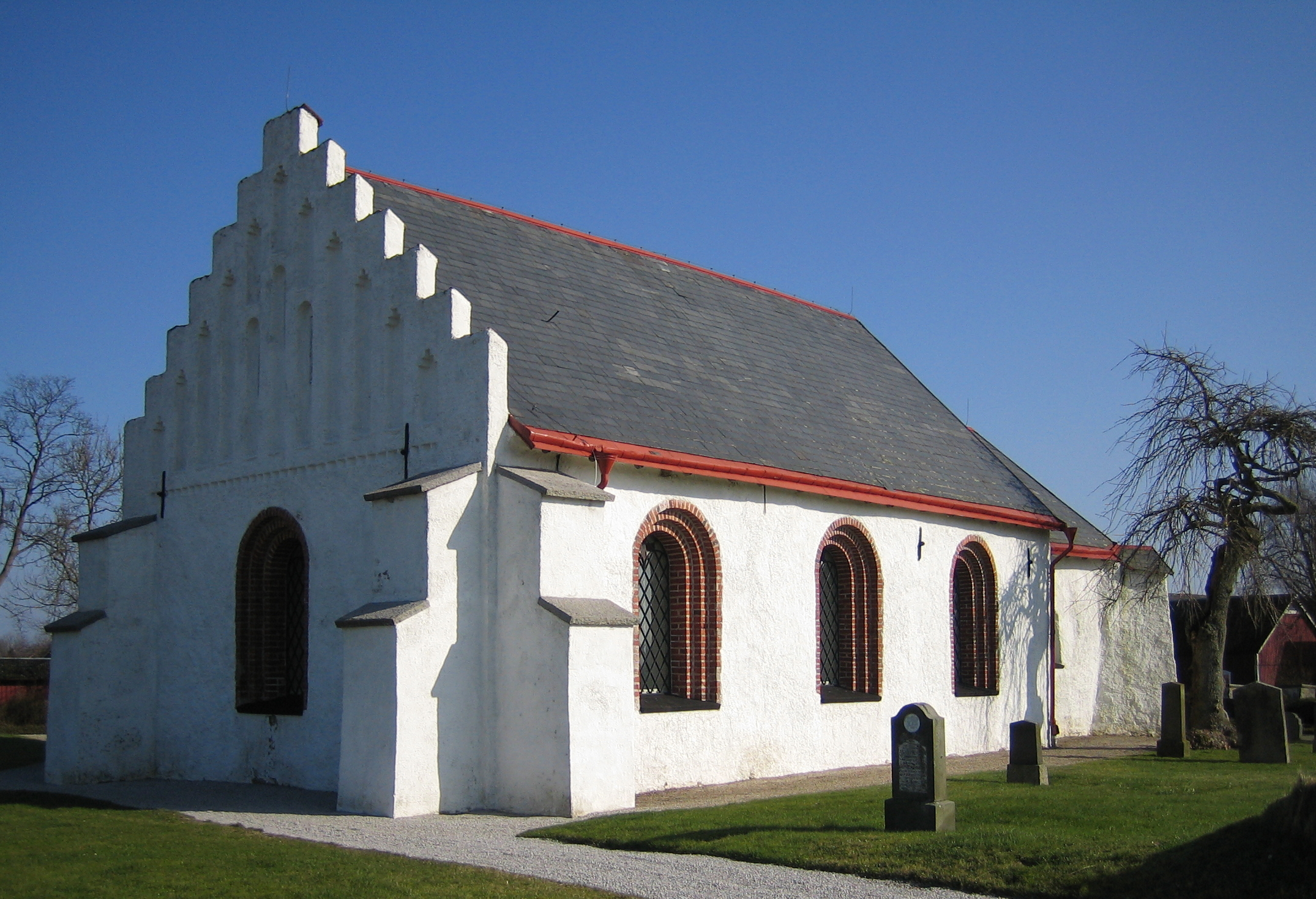 Östra Karaby kyrka in Skåne, Sweden